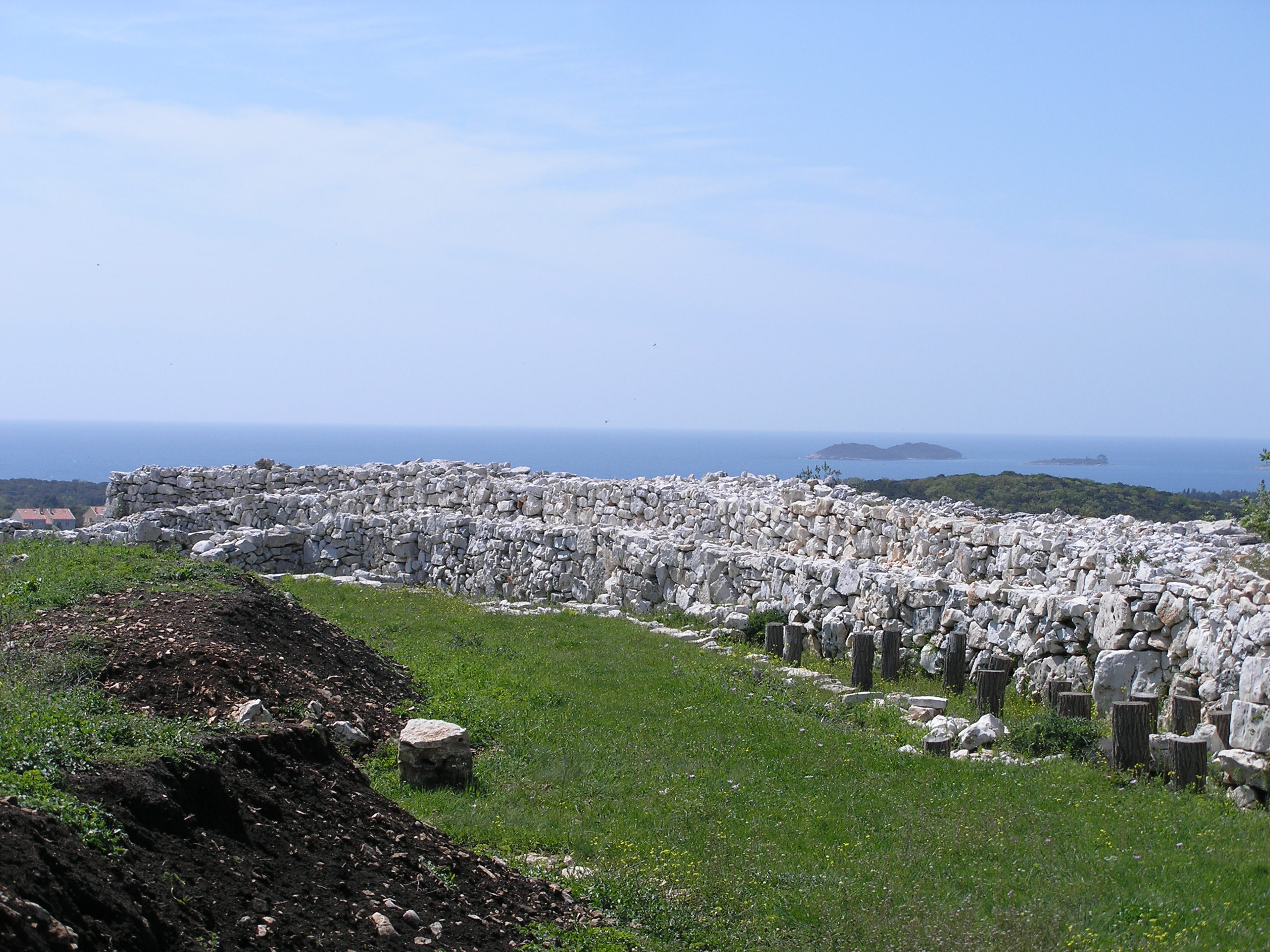 Monkodonja (Moncodogno) archaeological site in Istria